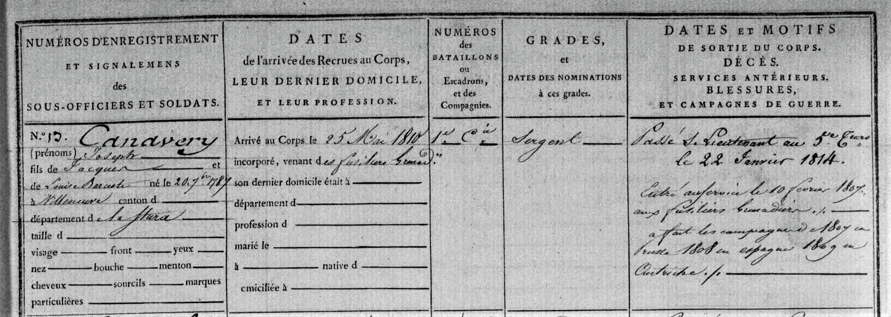 Fragment avec enregistrement des services militaires, appartenant à Joseph Canavery, né à Stura, Piémont, fils de Jacques Canavery et de Louise Barceste